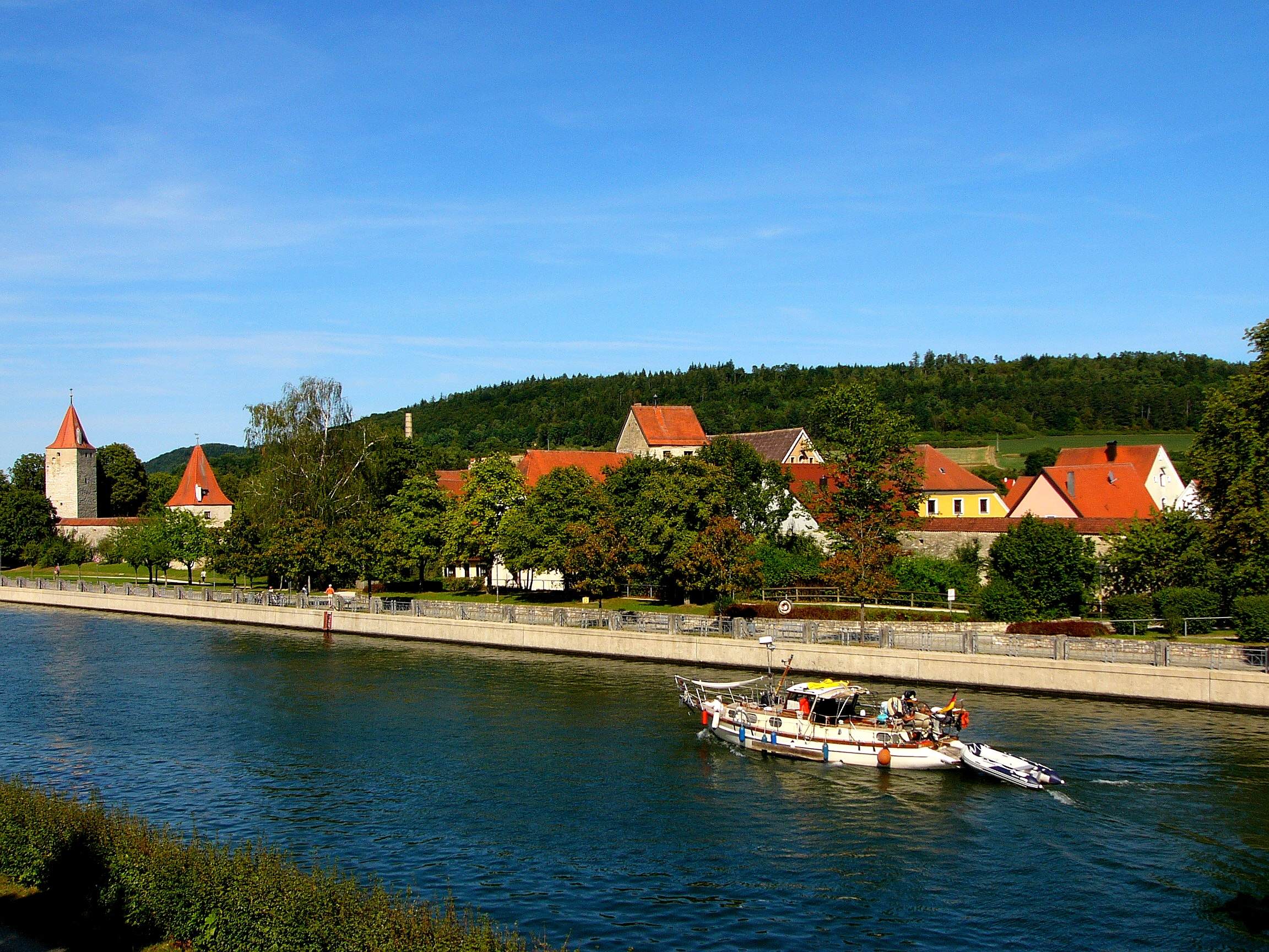 Mitten durch Berching verläuft der Main-Donau-Kanal.